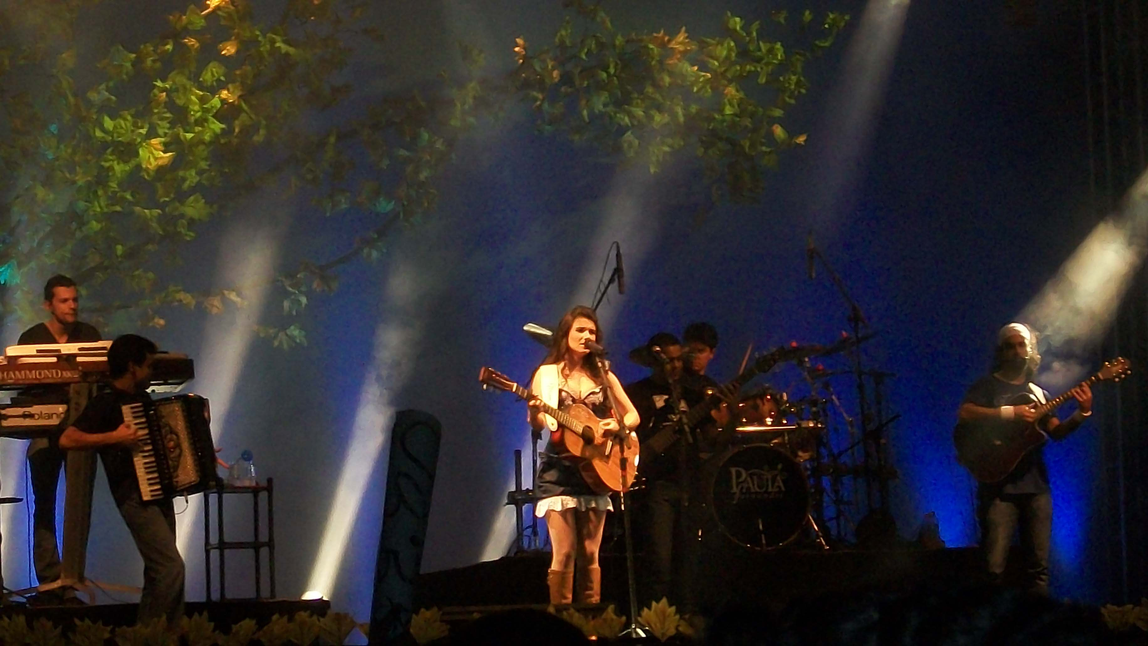 Show da cantora brasileira Paula Fernandes em Birigui em 14 de agosto de 2011.